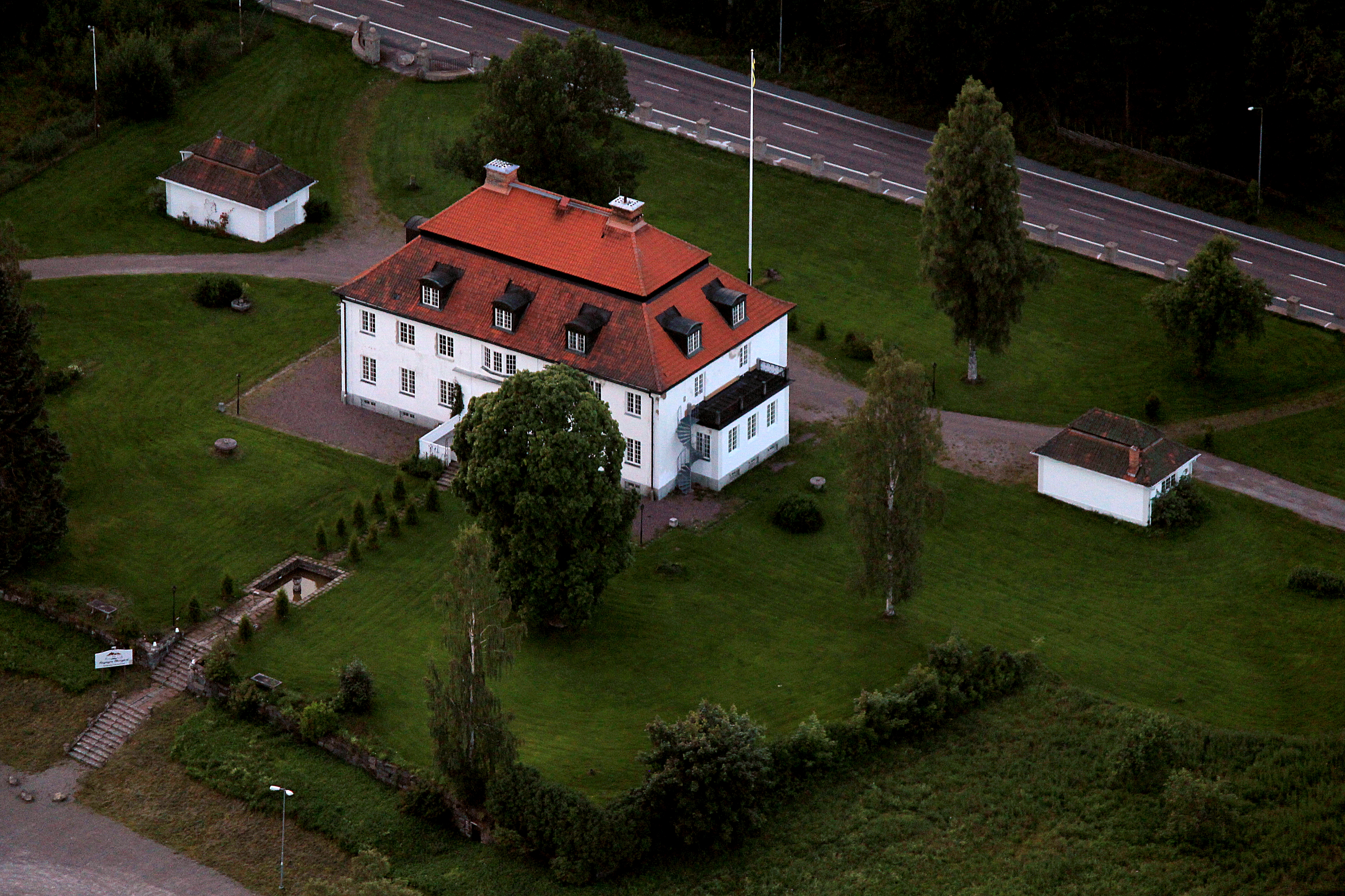 Flygfoto över Sågmyra herrgård, Falu kommun, Dalarnas län, Sverige This aerial photograph has been approved for publishing by the Swedish Armed Forces with the ID: FMTM 10 830:11043 This tag does not indicate the copyright status of the attached work. A normal copyright tag is still required. See Commons:Licensing for more information.